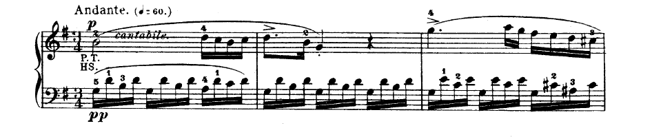 Wolfgang Amadeus Mozart – 2º movimento da Sonata K. 545